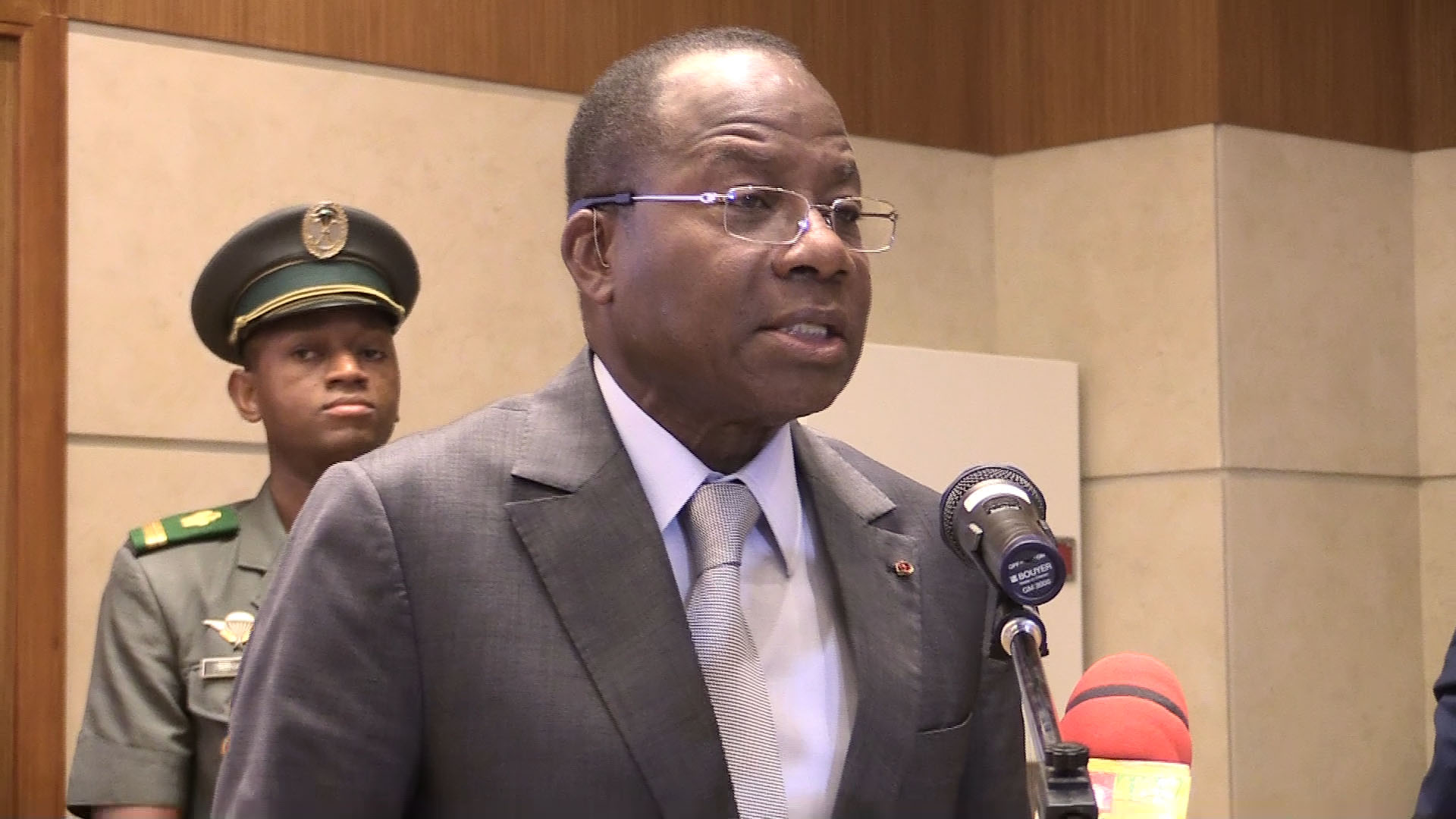 Adrien Houngbédji, président de l'Assemblée nationale à Cotonou, le 21 mars 2019. (VOA/Ginette Fleure Adandé)